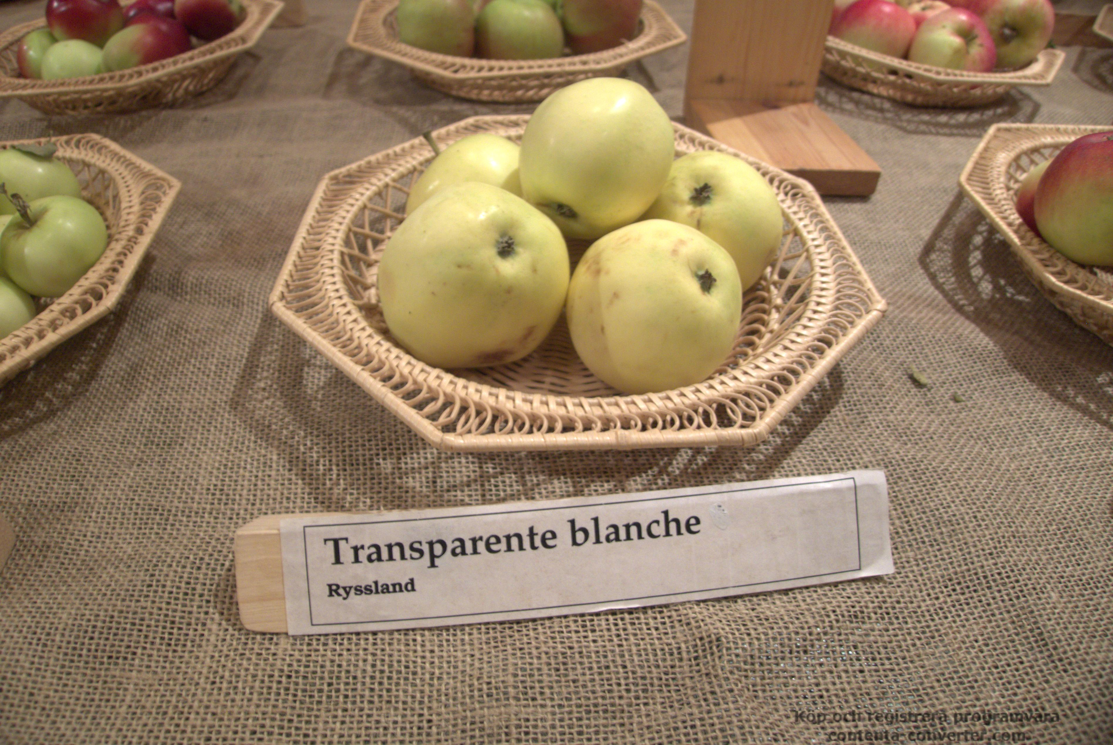 Äpplen av sorten Transparente blanche